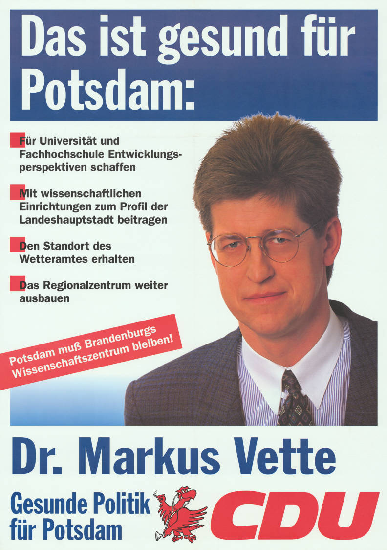 Das ist gesund für Potsdam: . Für Universität und Fachhochschule Entwicklungsperspektiven schaffen . Mit wissenschaftlichen Einrichtungen zum Profil der Landeshauptstadt beitragen . Den Standort des Wetteramtes erhalten . Das Regionalzentrum weiter ausbauen Potsdam muß Brandenburgs Wissenschaftszentrum bleiben! Dr. Markus Vette Gesunde Politik für Potsdam CDU Abbildung: Porträtfoto Plakatart: Kandidaten-/Personenplakat mit Porträt Objekt-Signatur: 10-033 : 219 Bestand: Landtagswahlplakate Brandenburg (10-033) GliederungBestand10-18: Landtagswahlplakate Brandenburg (10-033) » CDU Lizenz: KAS/ACDP 10-033 : 219 CC-BY-SA 3.0 DE